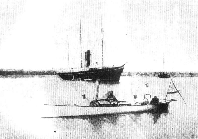 "Великий князь Константин" и миноноска "Чесма"